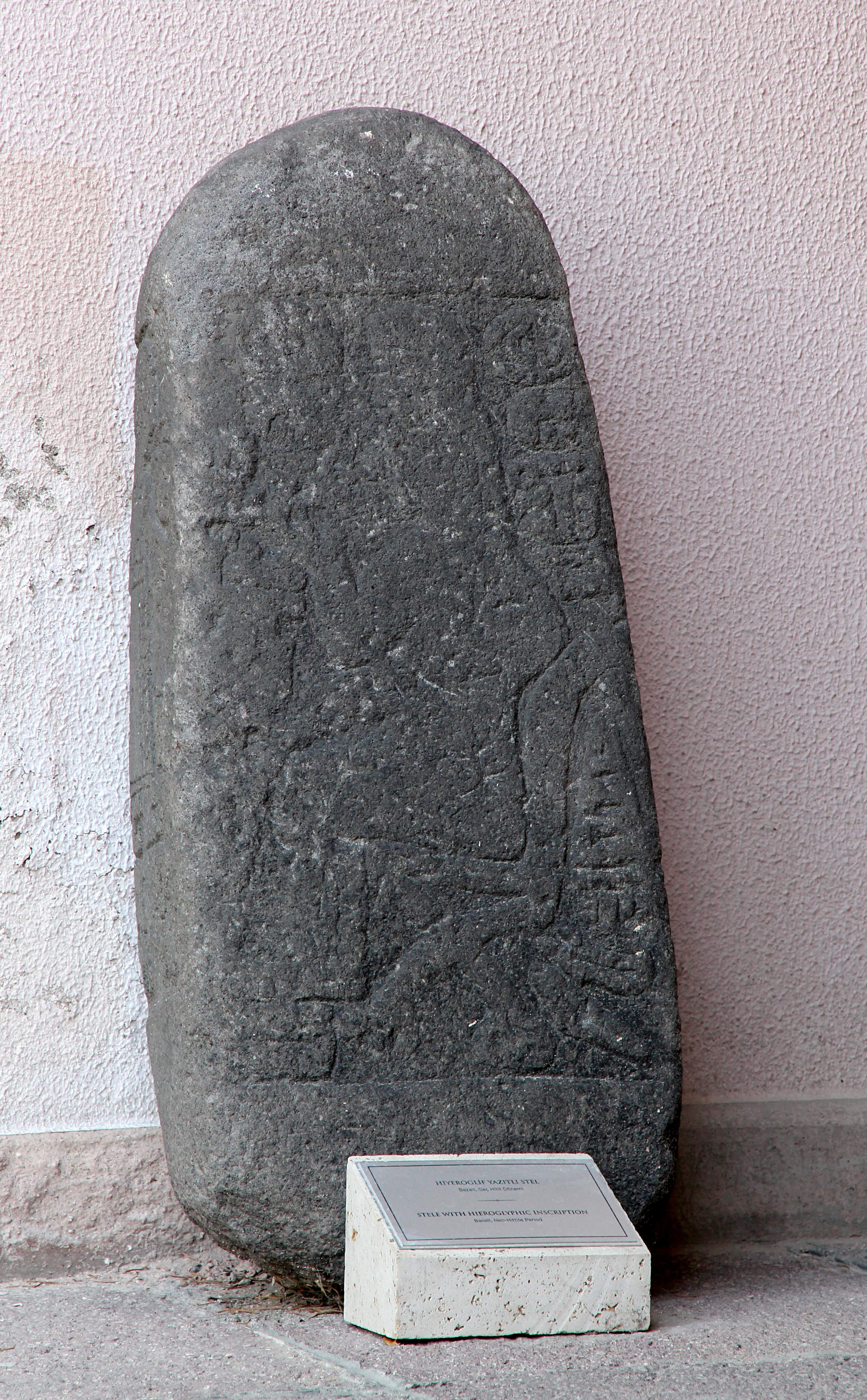 Museum für anatolische Zivilisationen, Ankara, späthethitische Stele von Darende